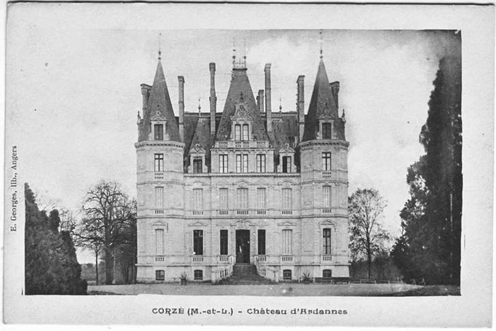 Château d'Ardannes, à Corzé.